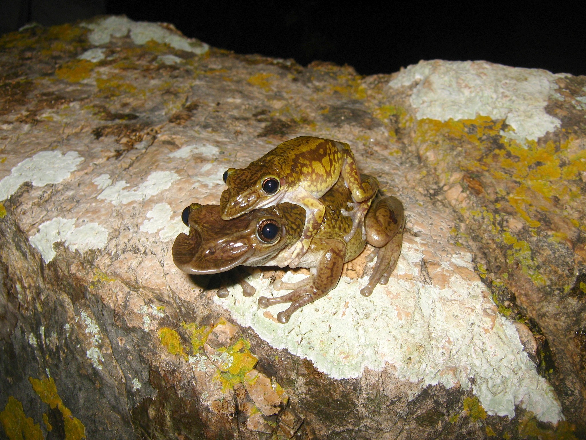 Rana Pico de Pato del Pacífico (Triprion spatulatus)